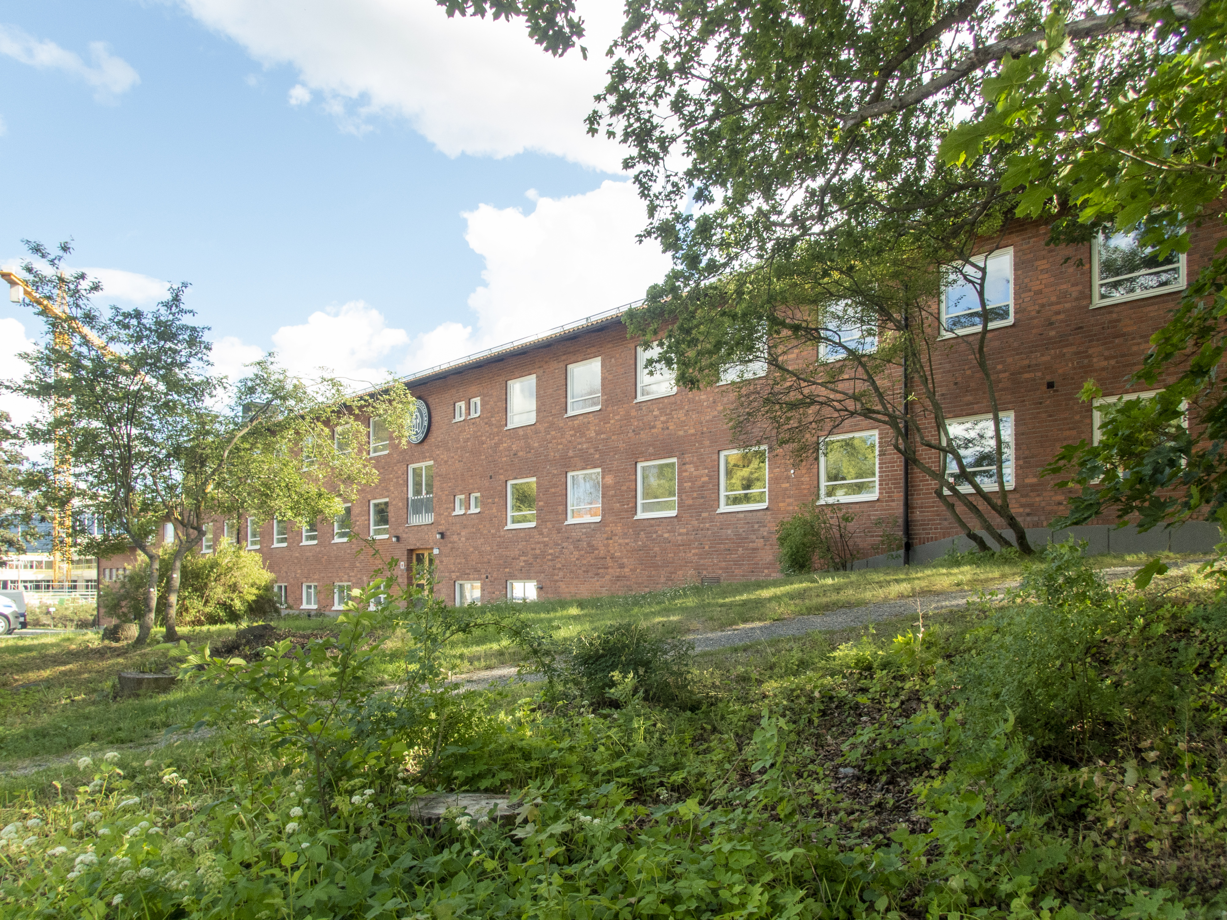 Veterinärhögskolan. Institutionsbyggnader (Fysiologi och Farmalogi) uppförda 1953. Arkitekt Carl Carl Grandinson